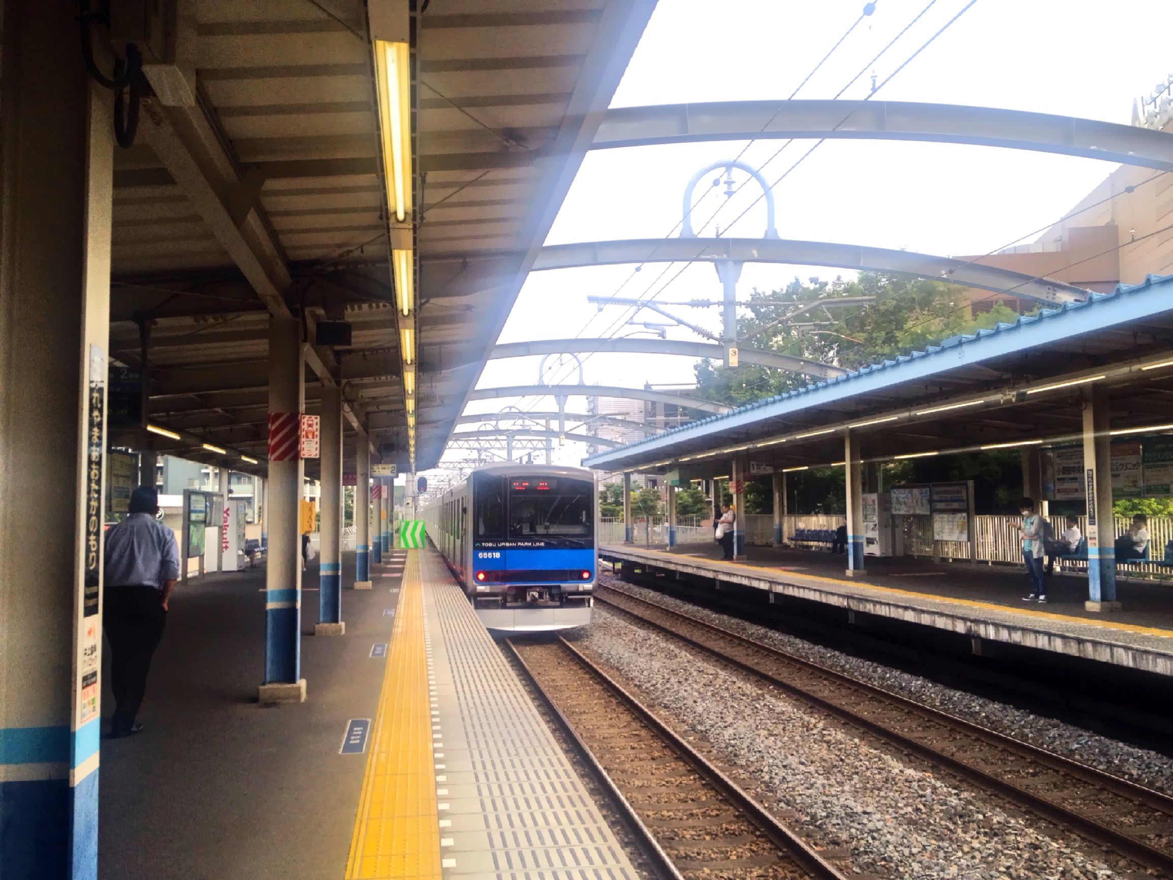 流山おおたかの森駅のホーム (Nagareyama-otakanomori station platforms)